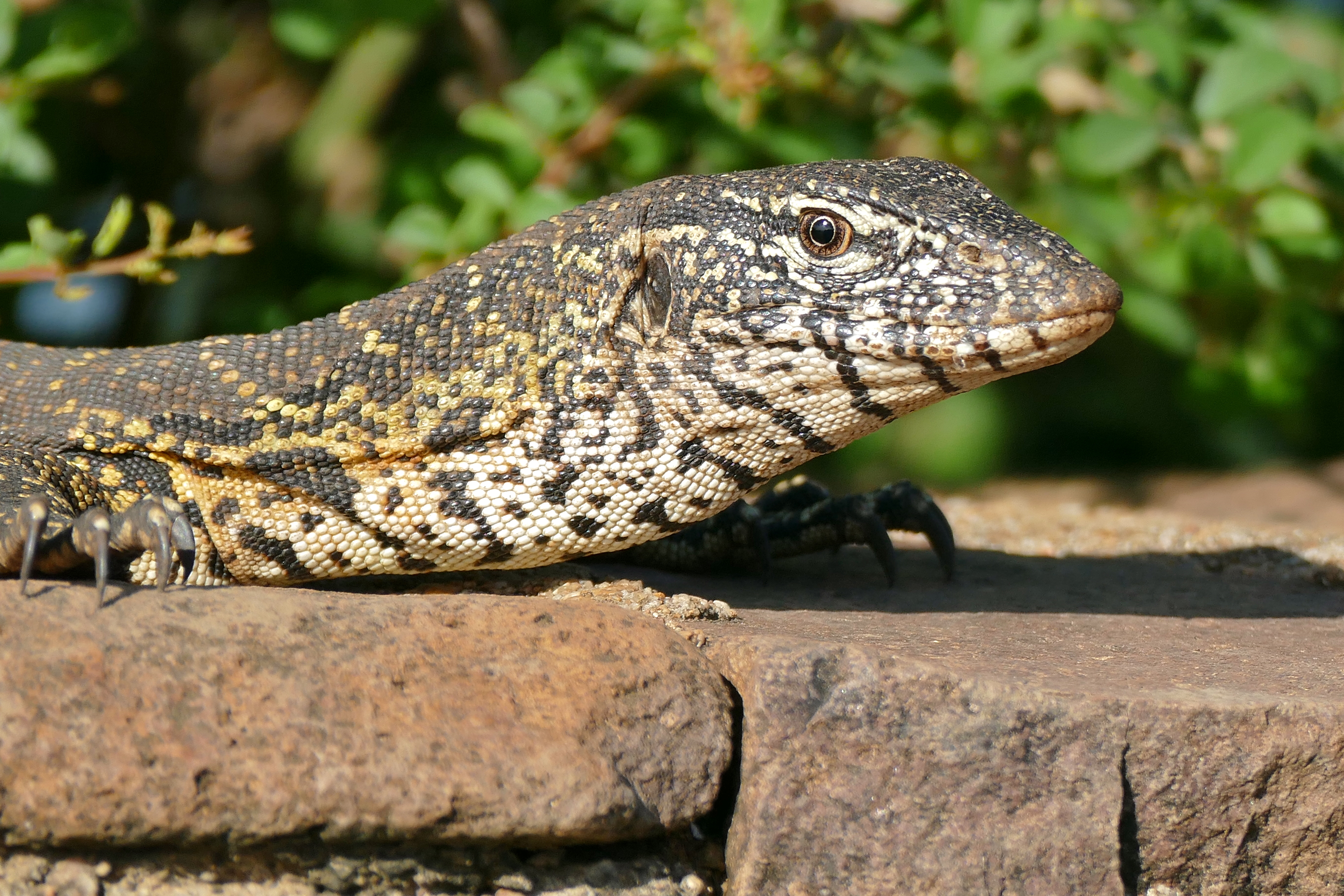 Sunset Dam, Lower Sabie, Kruger NP, SOUTH AFRICA